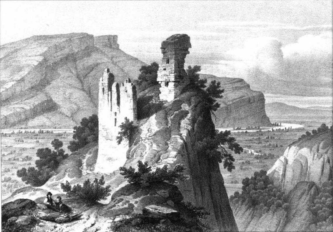 Album du Dauphiné - tome IV, litographie des environs de Voreppe, ruines du chateau